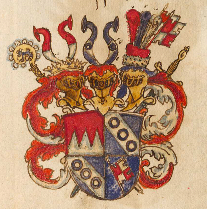 Wappen Julius Echter von Mespelbrunn, Bischof von Würzburg